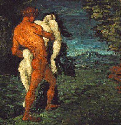 ontvoering van Alkestis door Herakles, uitsnede